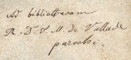 Unterschrift von Pfarrer Joseph Max von Vallade (1825-1882), Diözese Speyer, bayerischer Adeliger, Bruder von Heinrich von Vallade (1830-1870), dem Erzieher von König Ludwig III. von Bayern (eigener Scan von eigenem altem Buch, von 1860)